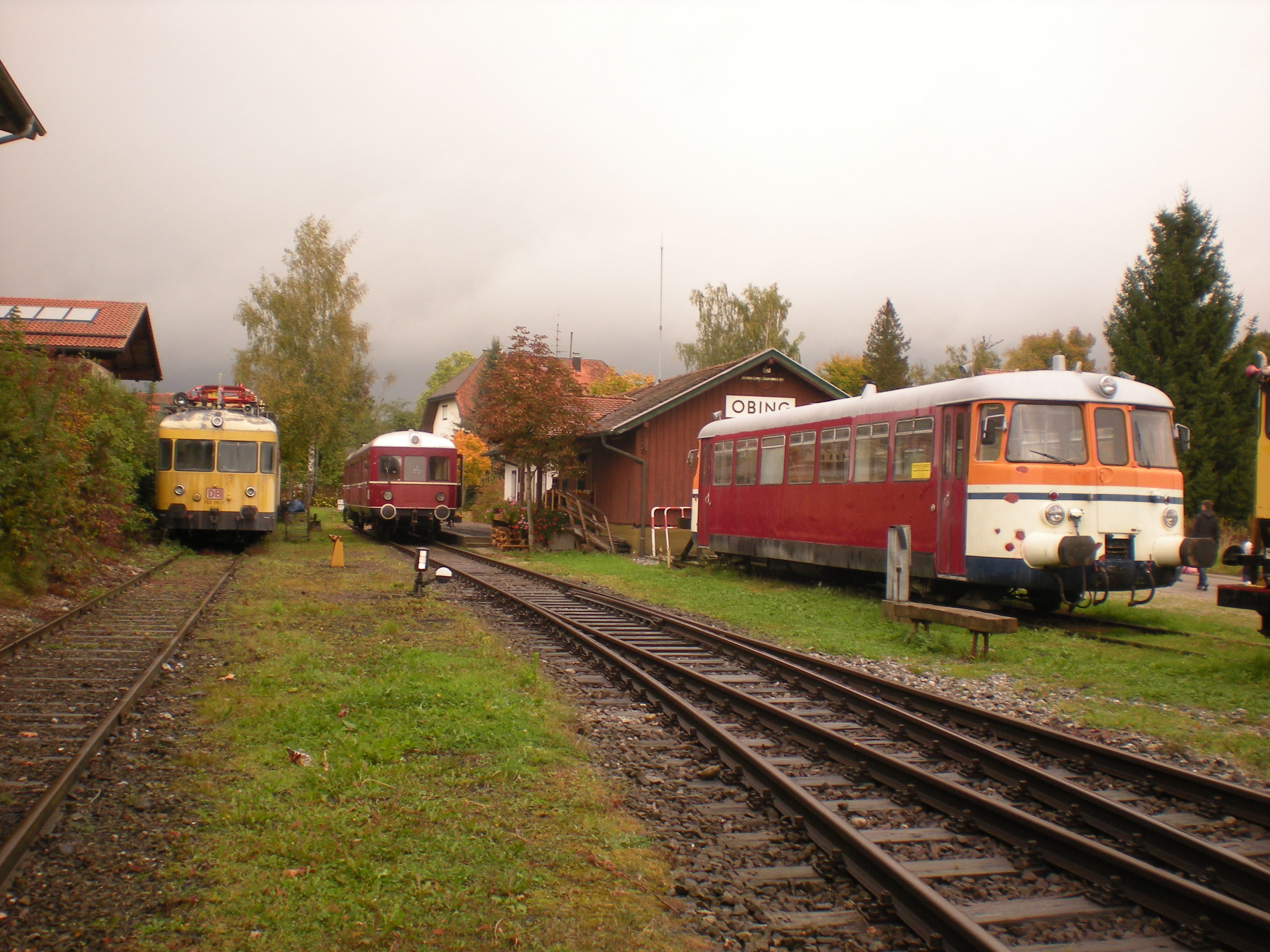 Gleisanlagen des Bahnhofs Obing an der Lokalbahn Endorf–Obing, von links nach rechts: Oberleitungs-Instandhaltungsfahrzeug der Baureihe 702, Esslinger Triebwagen VT 103 und MAN-Schienenbus